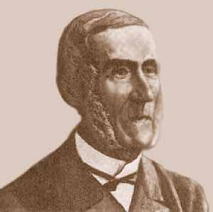 Галахов, Алексей Дмитриевич